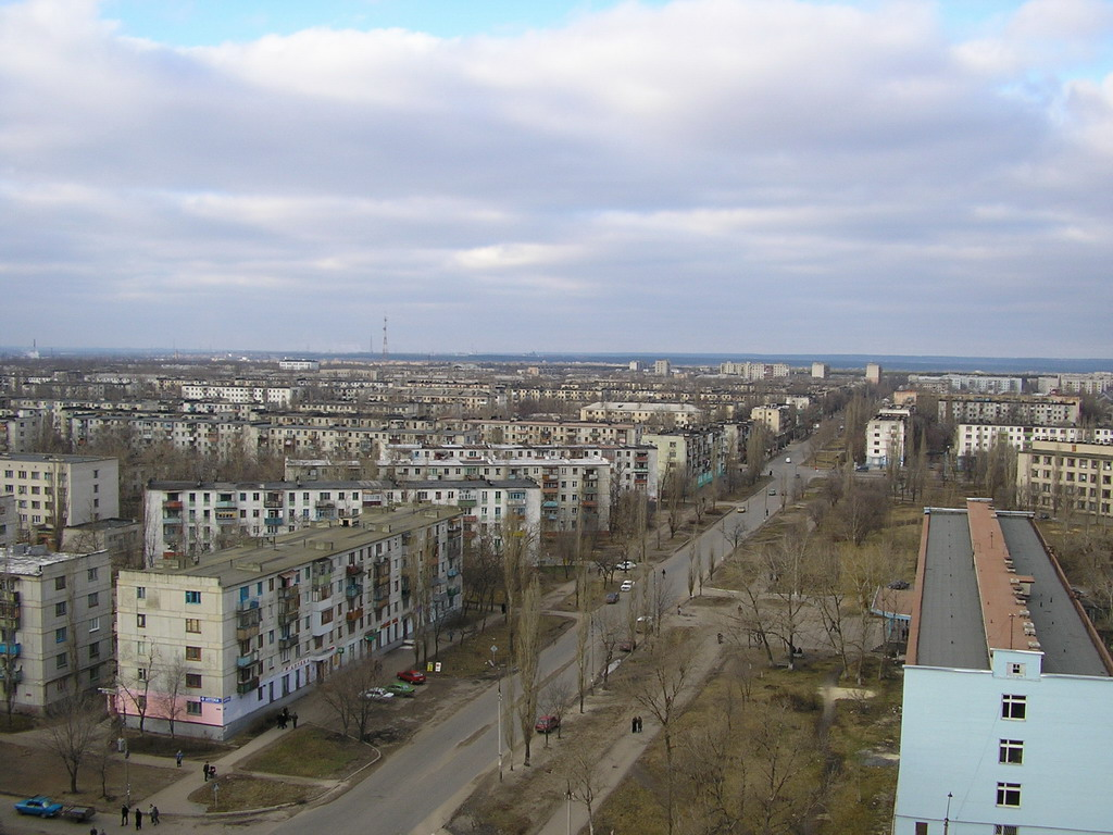 Стара частина Сєвєродонецка: Стара частина Сєвєродонецка. На першому плані вулиця Донецька